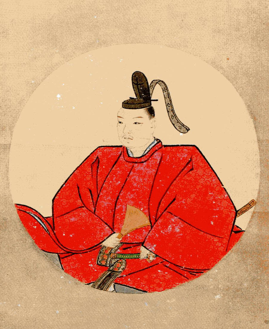 小出吉政像（一部）